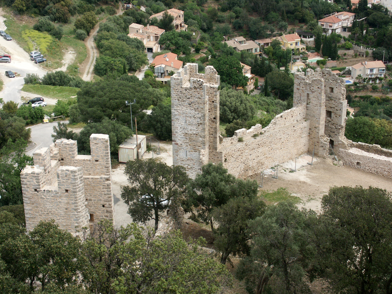 Portion nord de la courtine de la première enceinte médiévale de la ville d'Hyères. Il s'agit du tronçon proche de l'angle nord-est du château et qui inclut les première, deuxième et troisième tours en partant de celui-ci. Cette enceinte ne serait pas antérieure au XIIIe siècle.